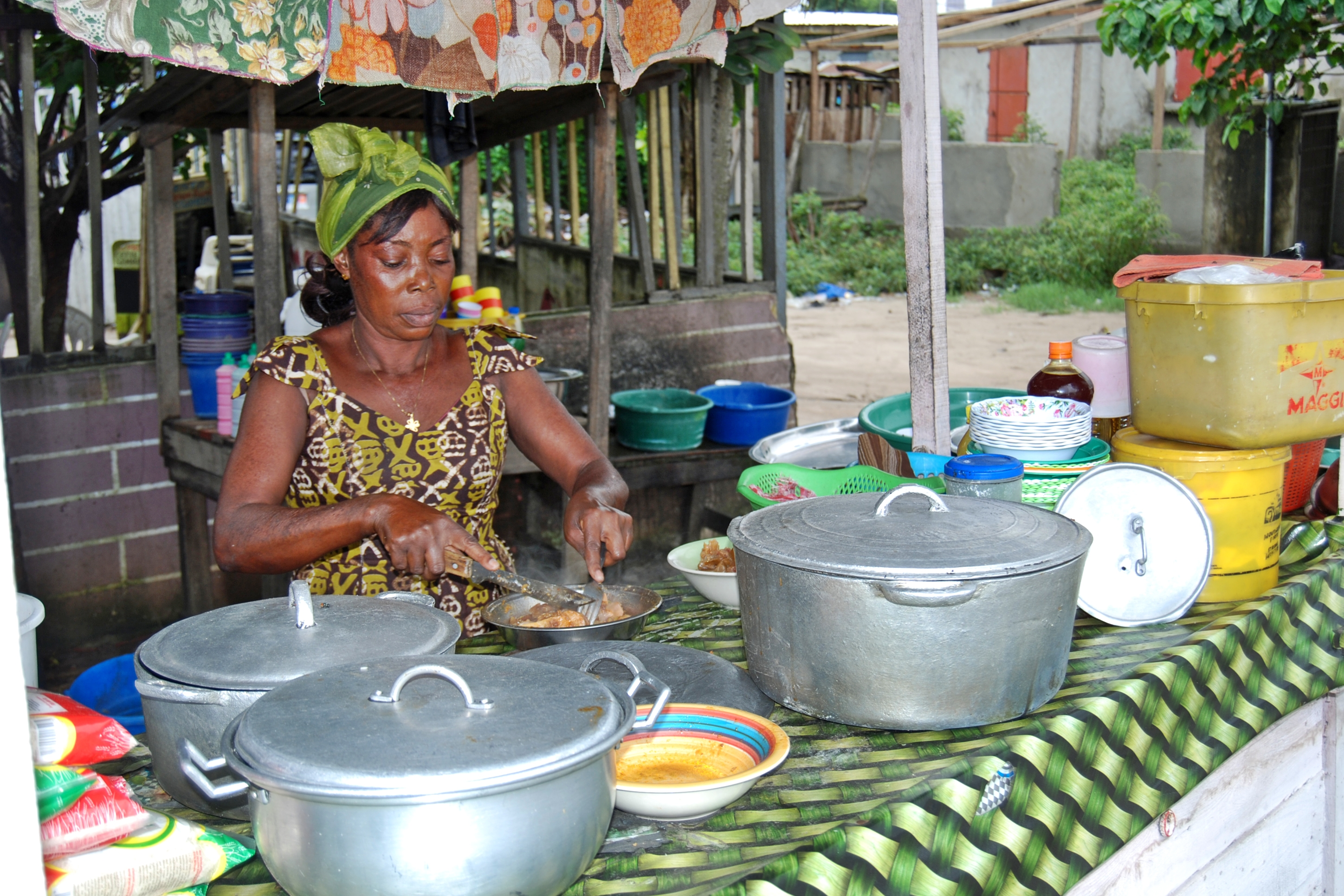 une restauratrice dans la ville d'Abidjan This is an image of "African people at work" from Ivory Coast